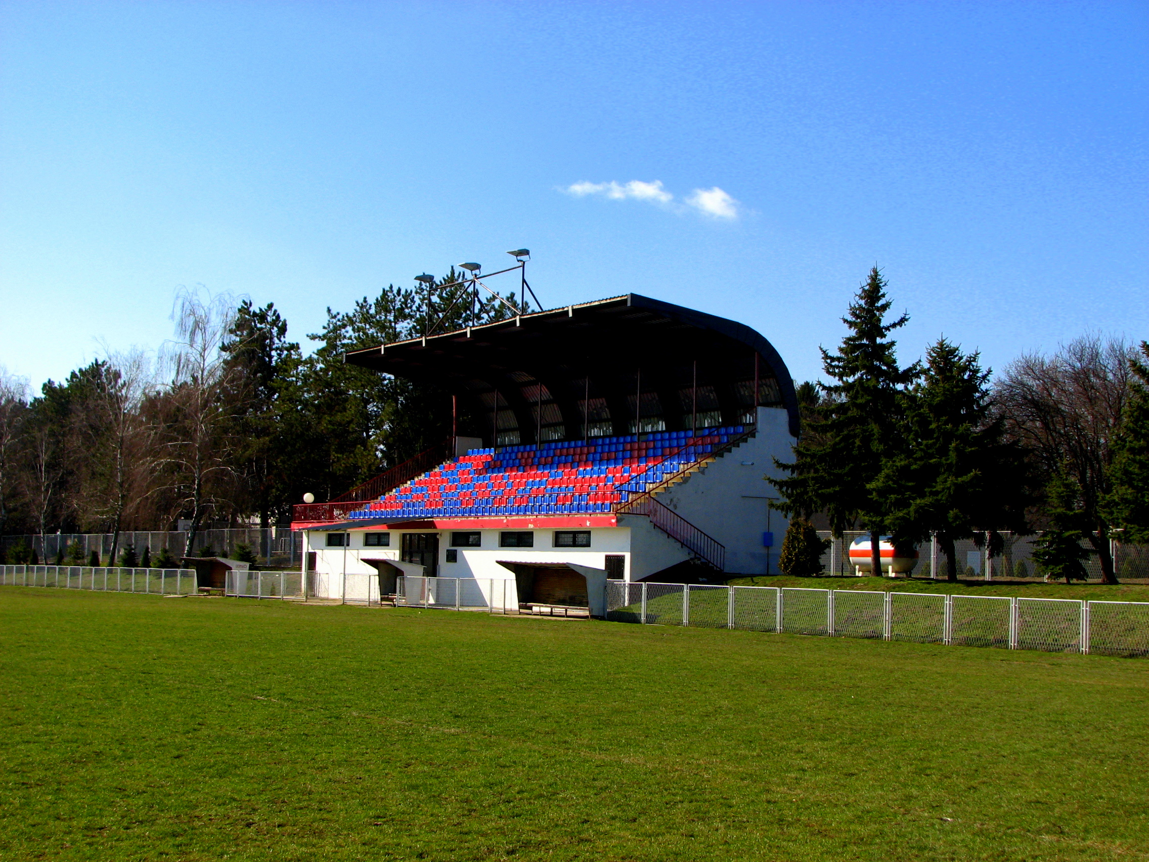 ФК "Борац" Кнежеви Виногради Аутор: Бранко Д. Тодоровић